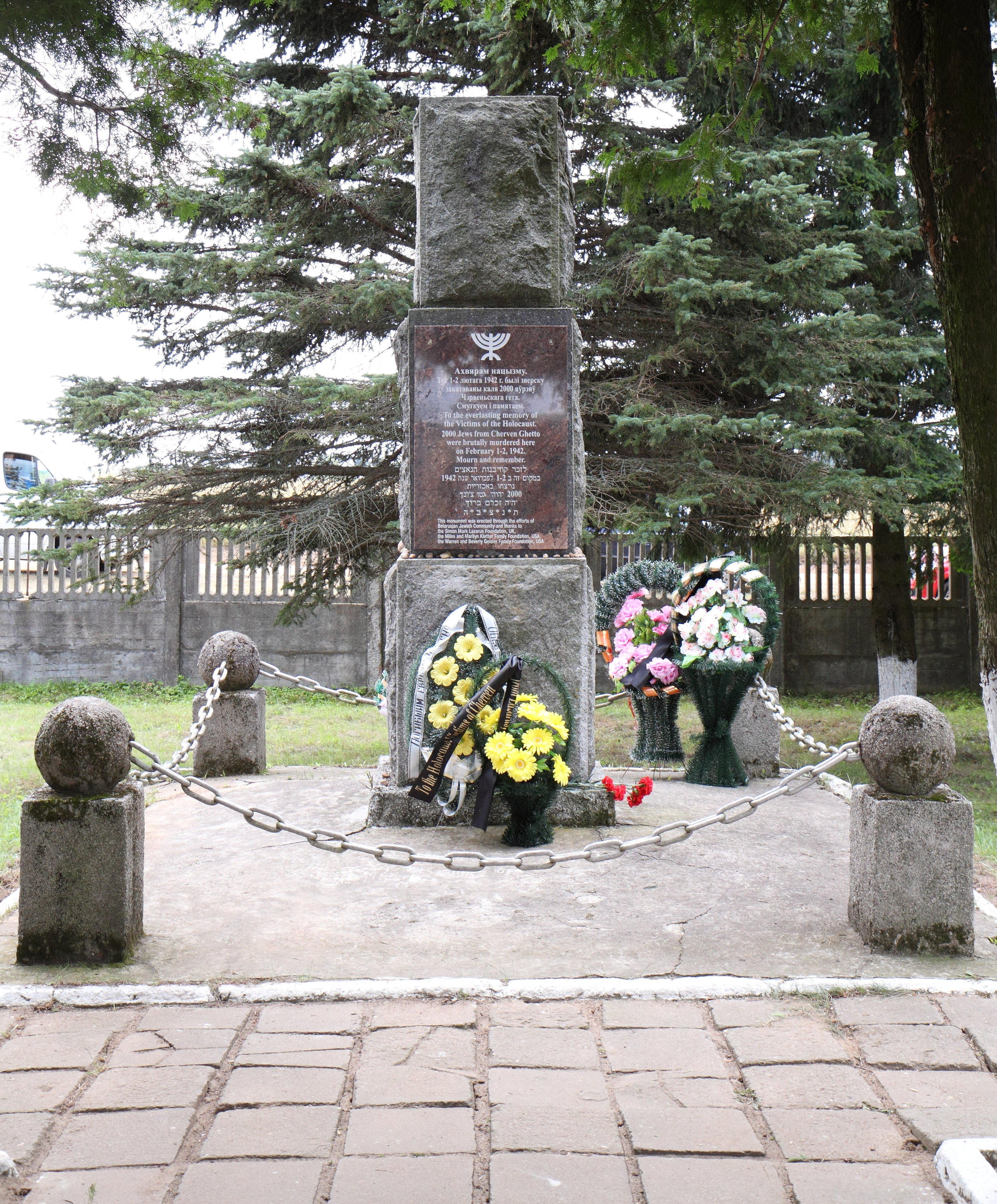 Памятник на месте массового убийства 2000 евреев Червеньского гетто 1-2 февраля 1942 года. Открыт 25 августа 1968 года, а в 2012 году на месте надписи прикреплена новая доска с текстом. Находится на окраине Червеня в конце улицы Заметовского (урочище Глинищи).